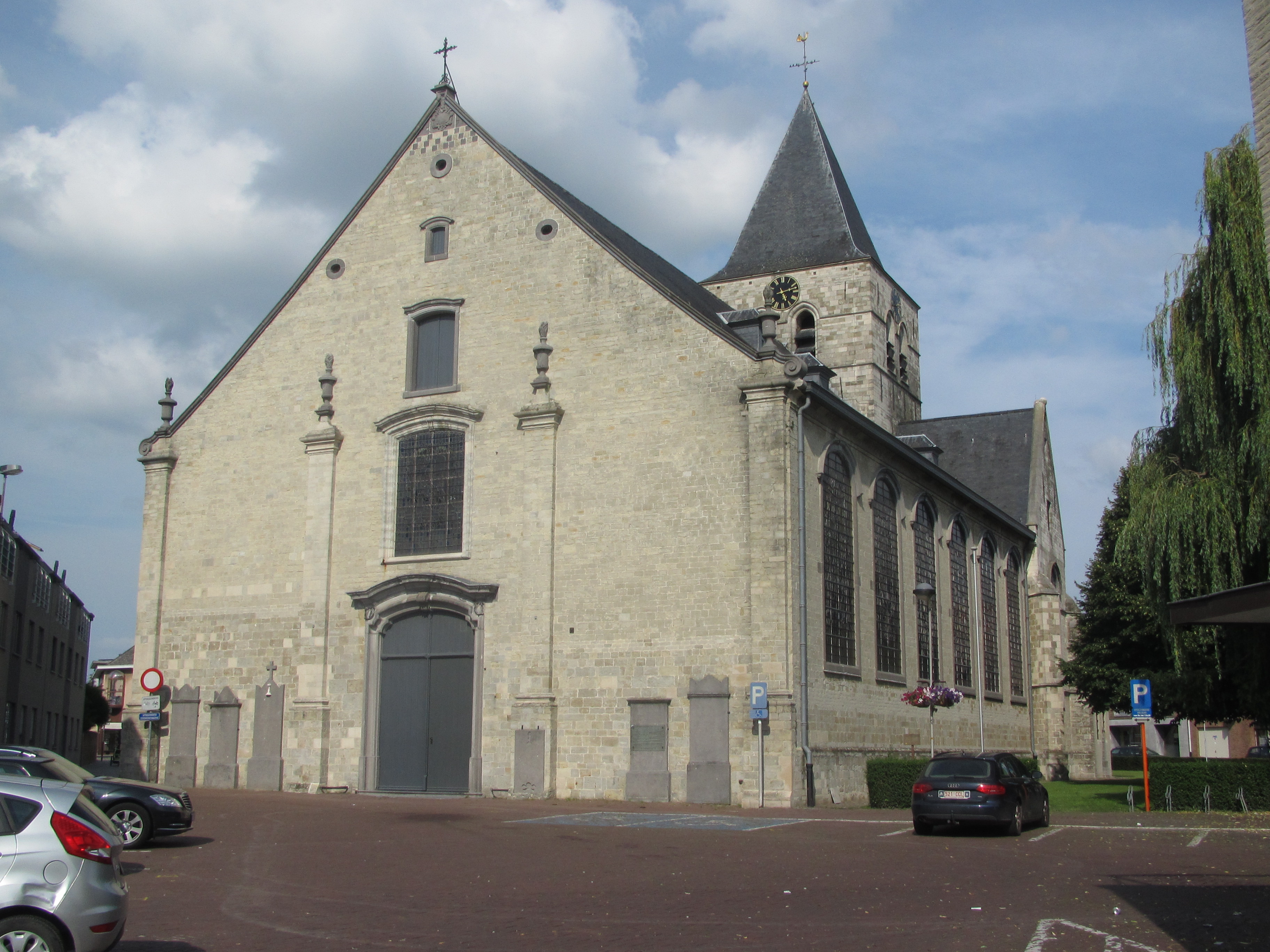 De Sint-Pauluskerk van Opwijk Vroeger vond de apotheose van de Sint-Pauluspaardenprocessie met de zegening van de deelnemers plaats op het plein voor de kerk